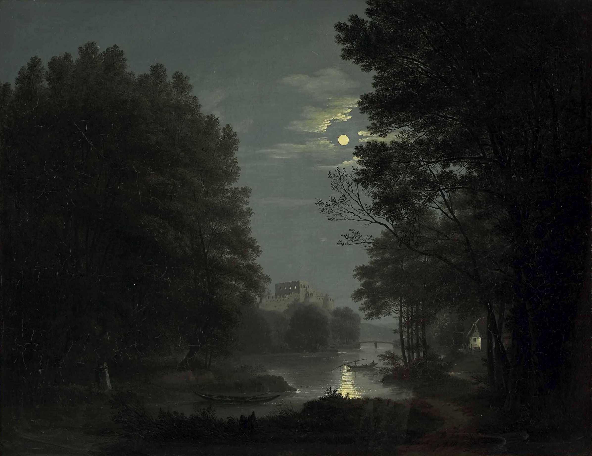 Liebespaar bei Vollmondnacht am Flussufer mit Ruinen